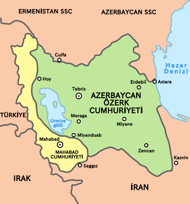 1945-1946 yıllarında Azerbaycan Özerk Cumhuriyeti ve Mehâbâd Cumhuriyeti'ni gösterir harita.